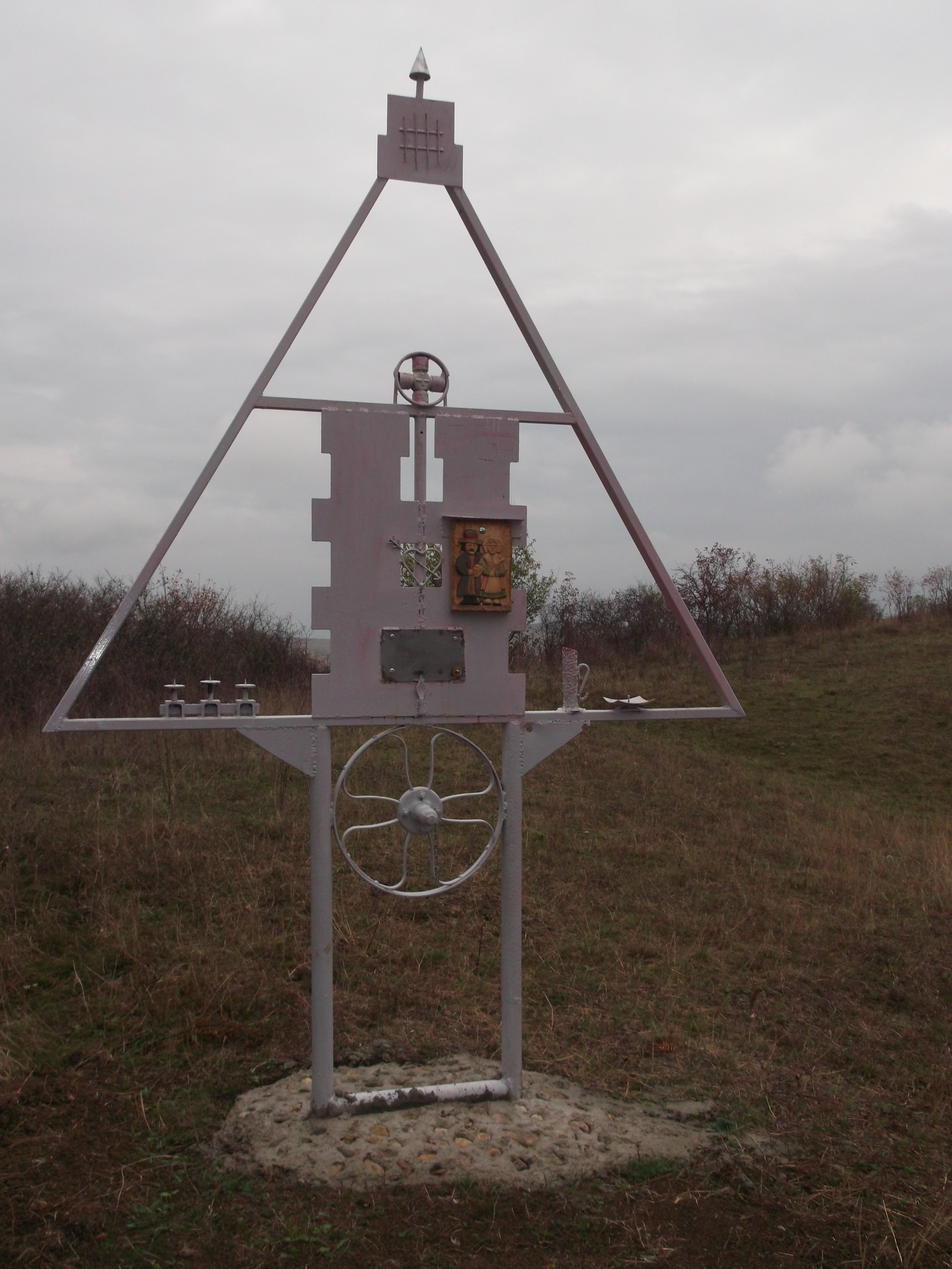 Aruncuta -Cripta celebrelor familii nobiliare Haller de Hallerko si Kornis de Goncz - Ruszko, autor Gh.Tare